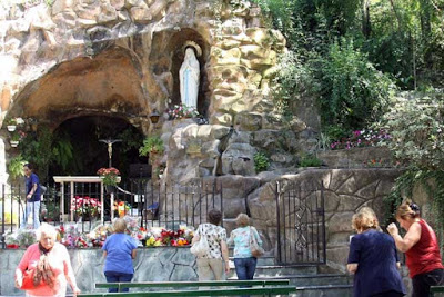 Gruta Nuestra Señora de Lourdes en Alta Gracia